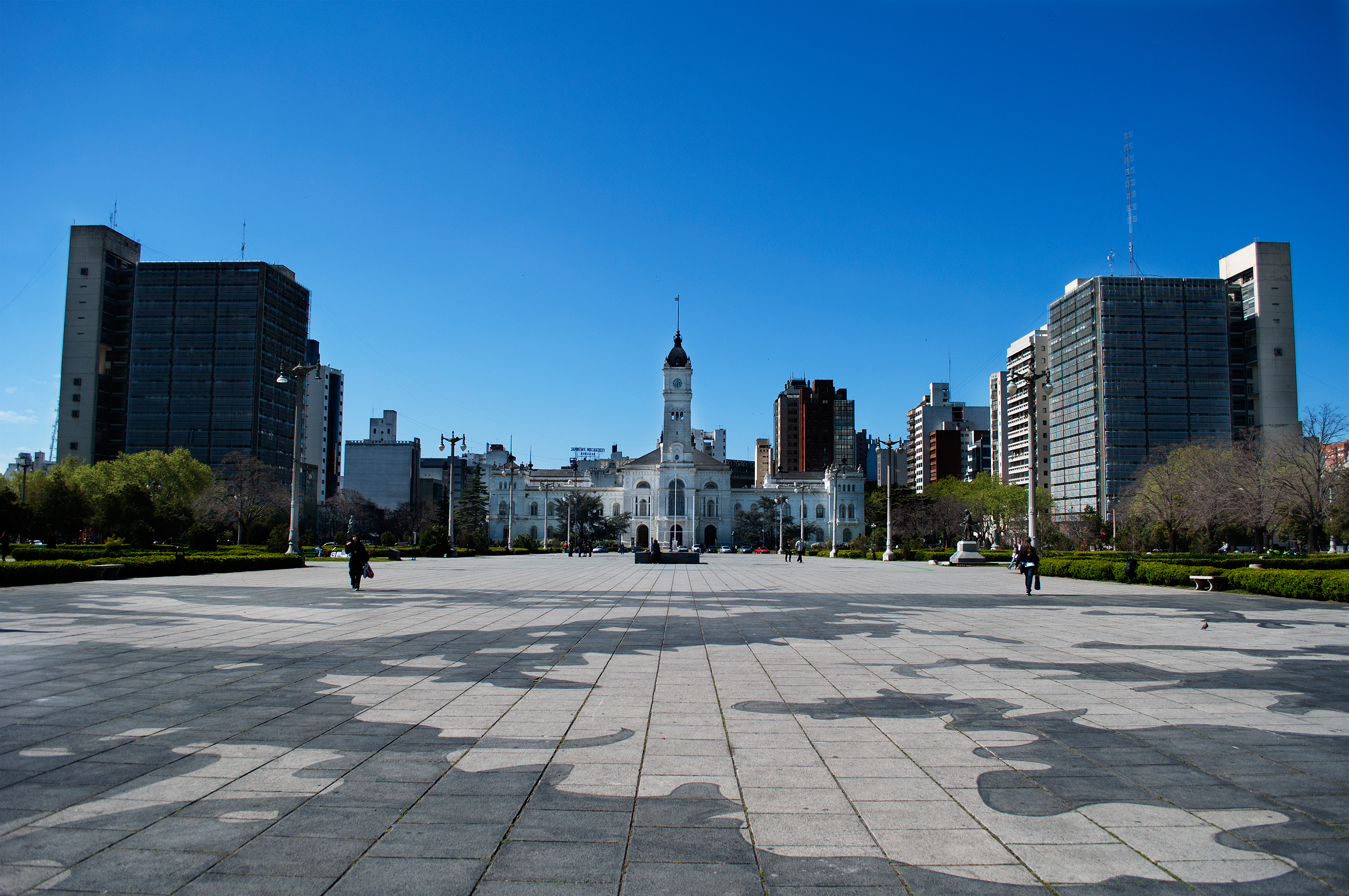 Municipalidad de la Ciudad de La Plata